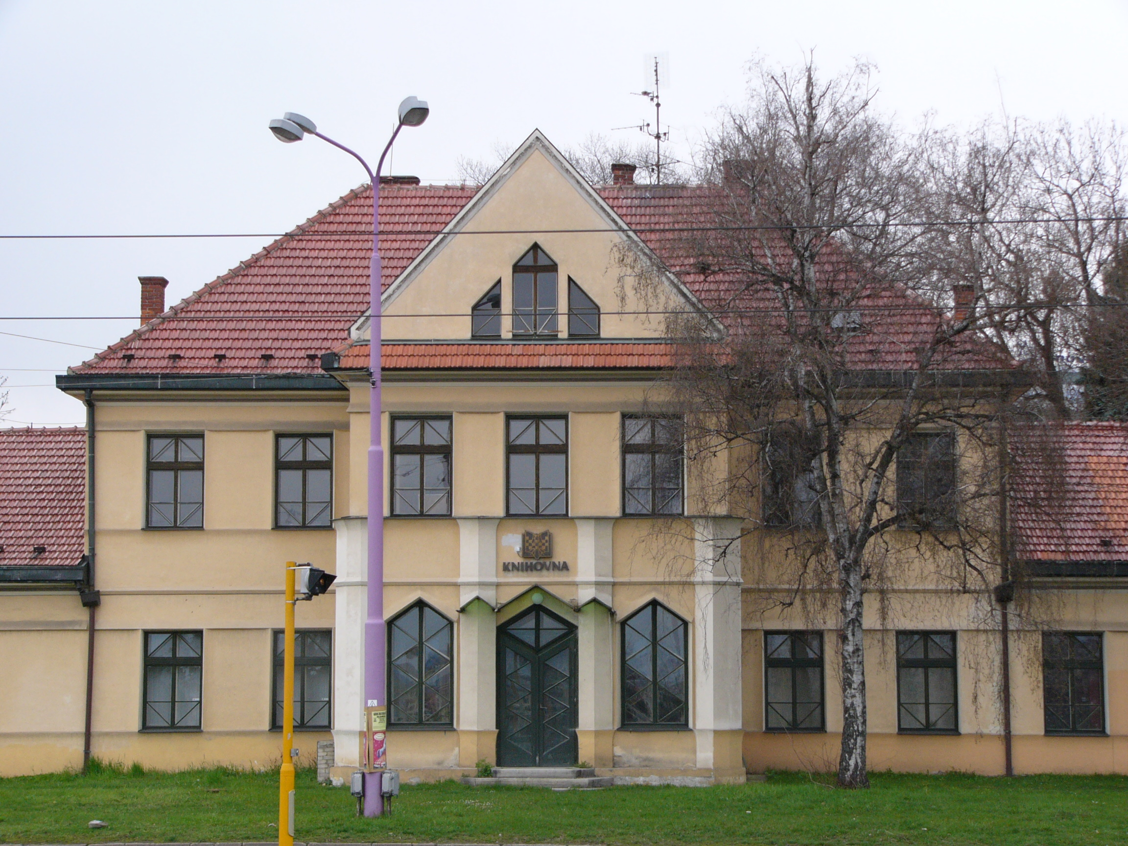 Vila Františky Lipčíkové (Hrubanova) (Olomouc), Brněnská 500/80, Olomouc